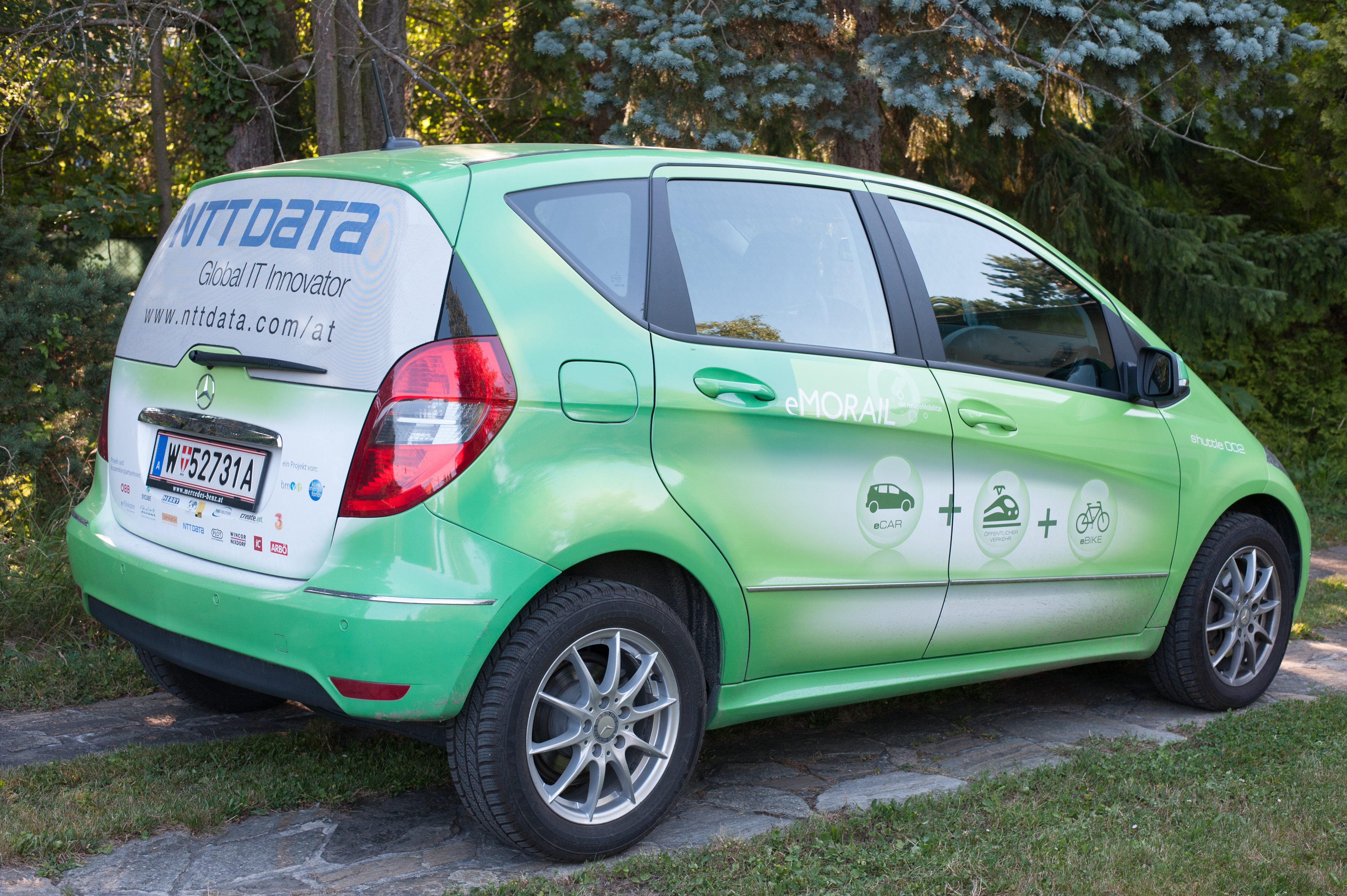 Mercedes-Benz W169 E-Cell